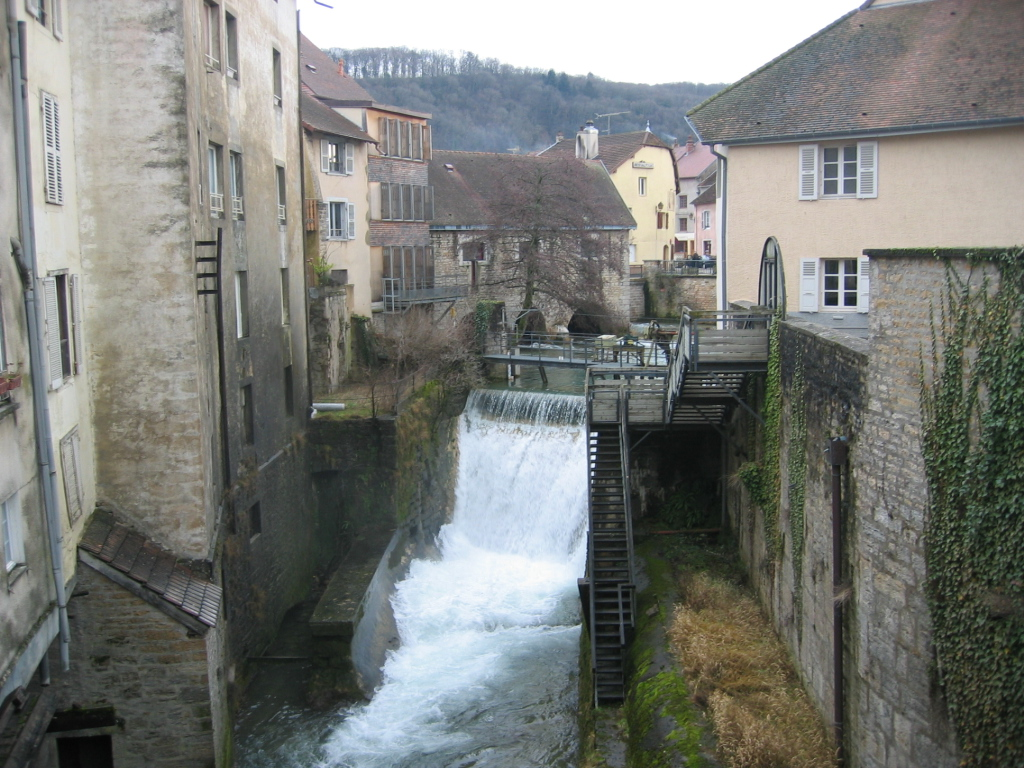 Arbois - Jura - France